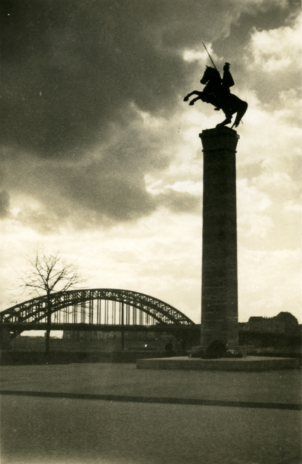 1900-lancier dusseldorf